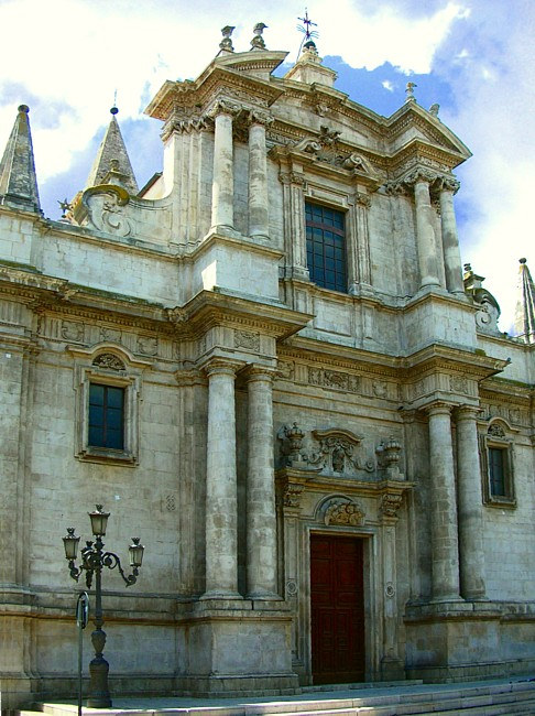 Sulmona, Chiesa della SS. Annunziata Picture taken by user:Idéfix july 2005